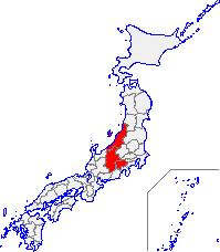 甲信越地方の位置